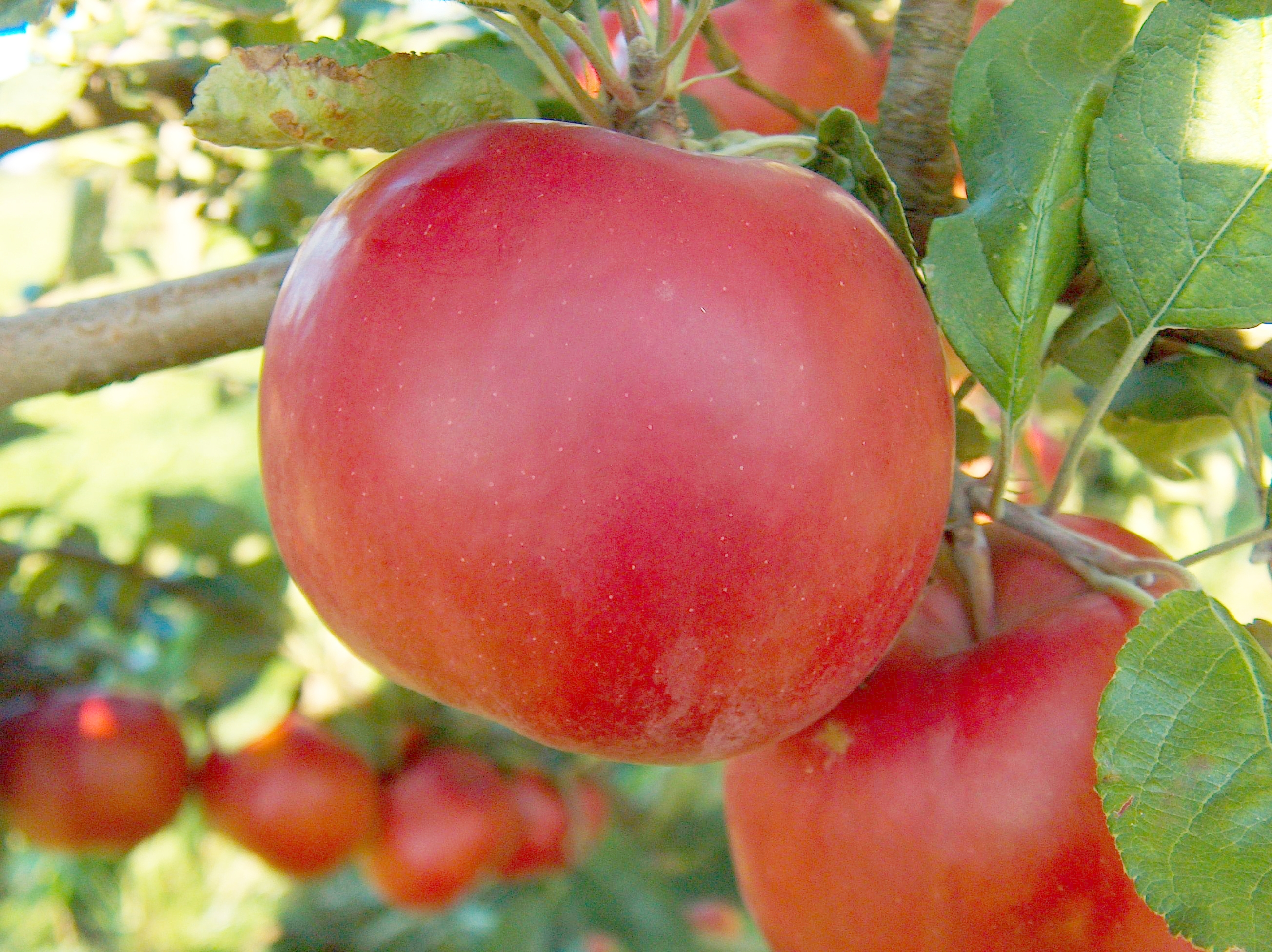 McIntosh am Baum